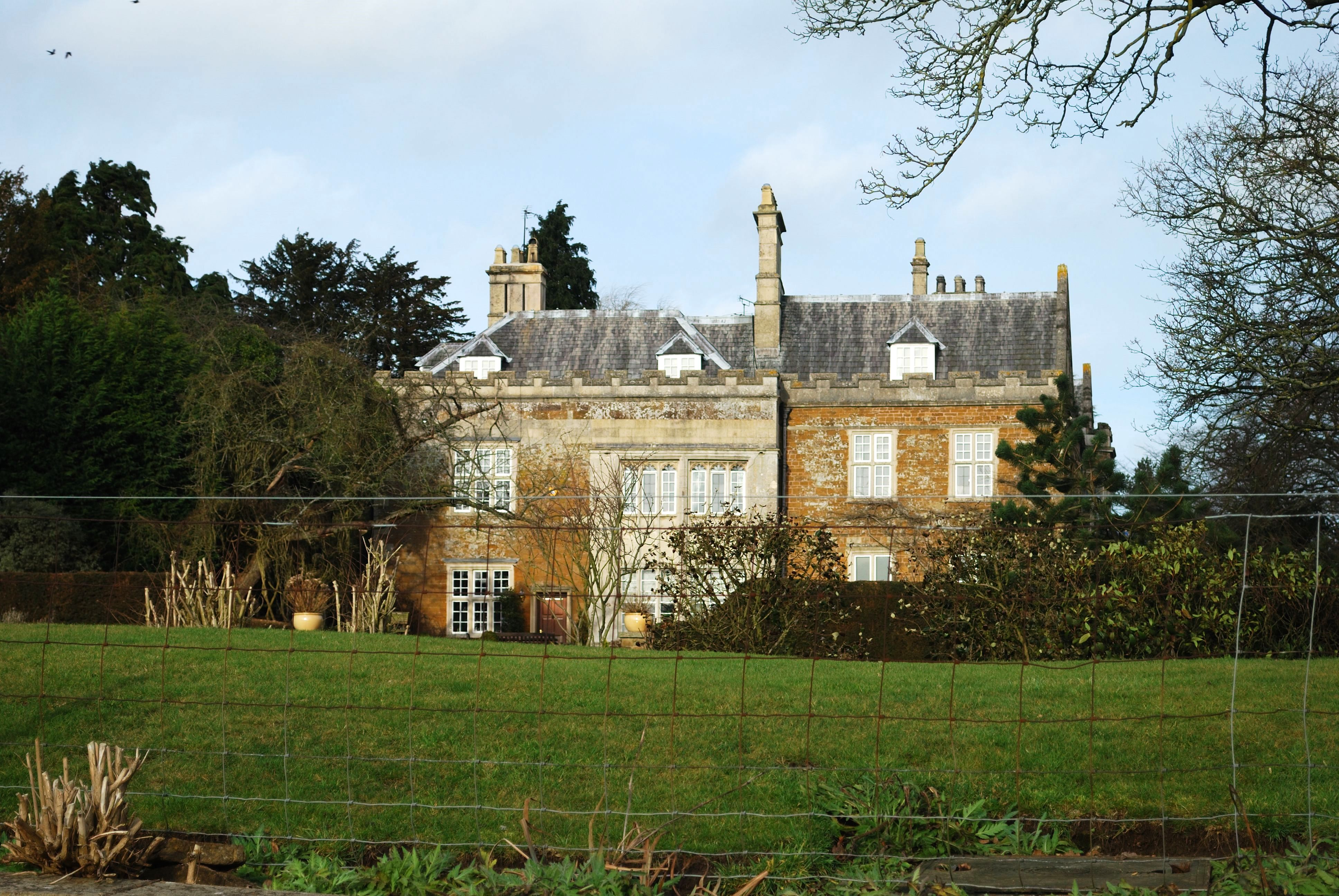 Skeffington Hall